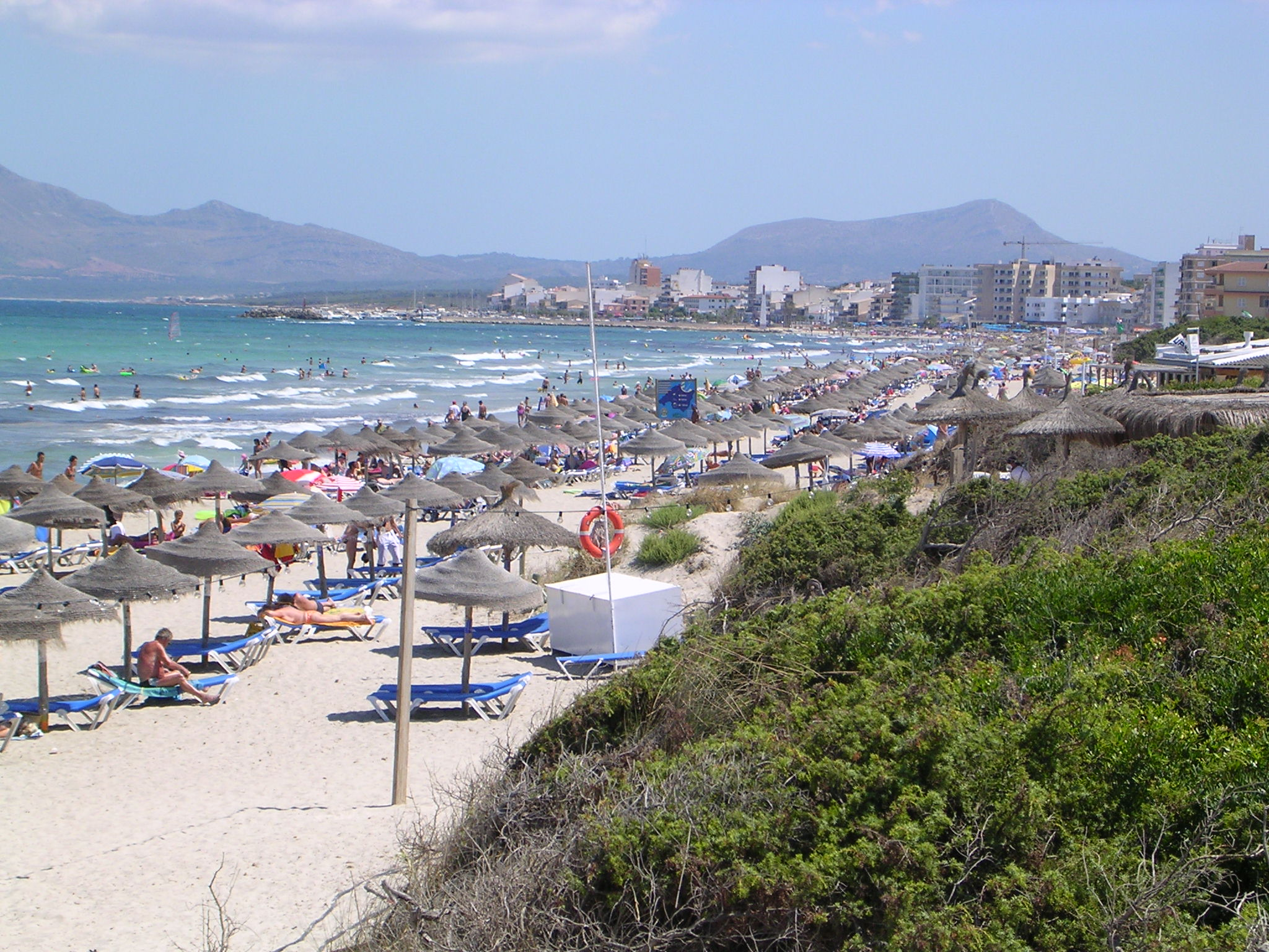 Can Picafort (Mallorca)